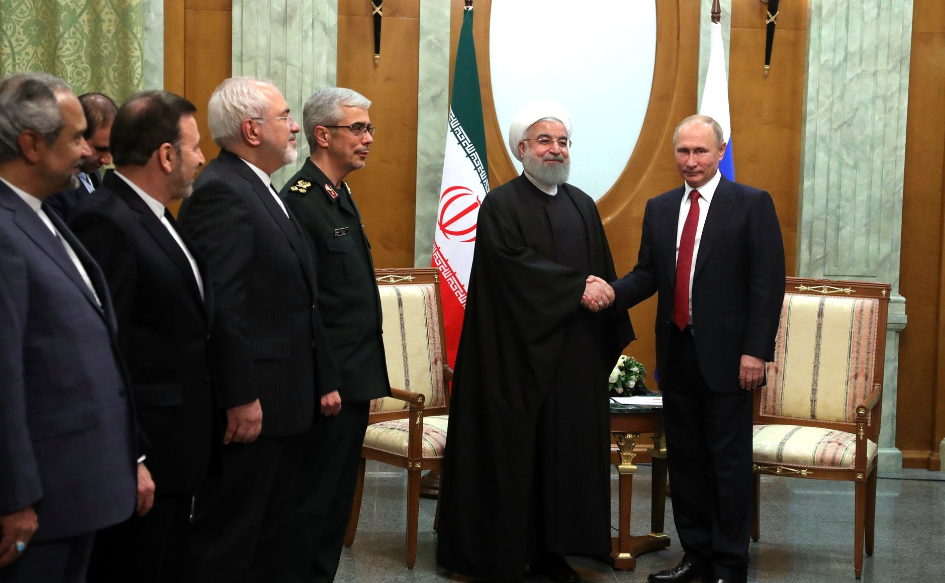 Встреча Президента России Владимира Путина с Президентом Ирана Хасаном Рухани